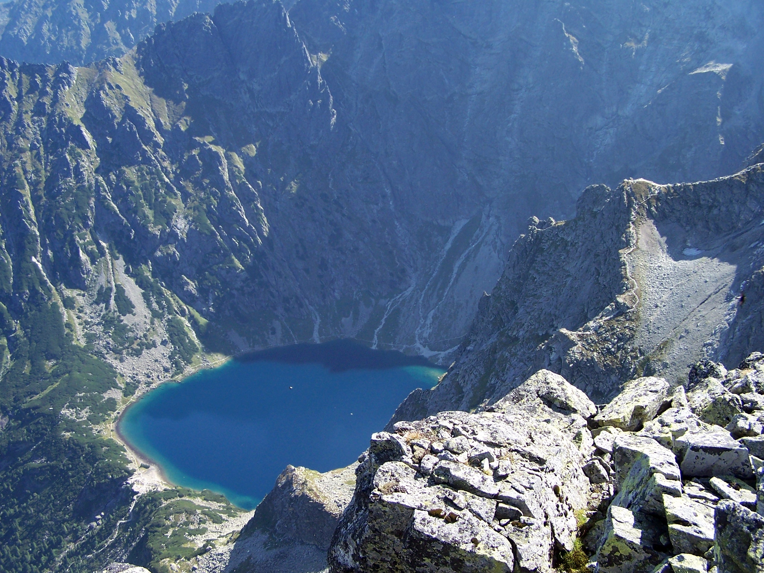 Czarny Staw pod Rysami